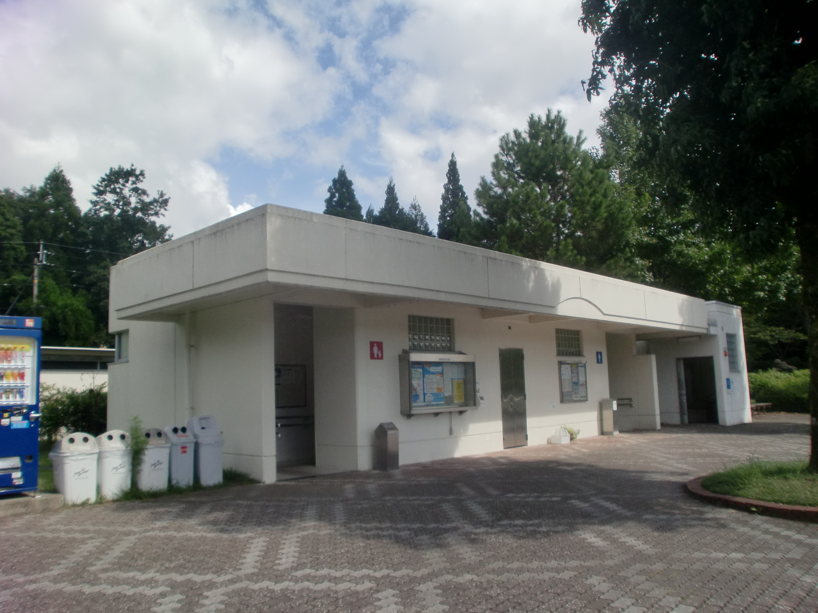 吉松パーキングエリアの外観。